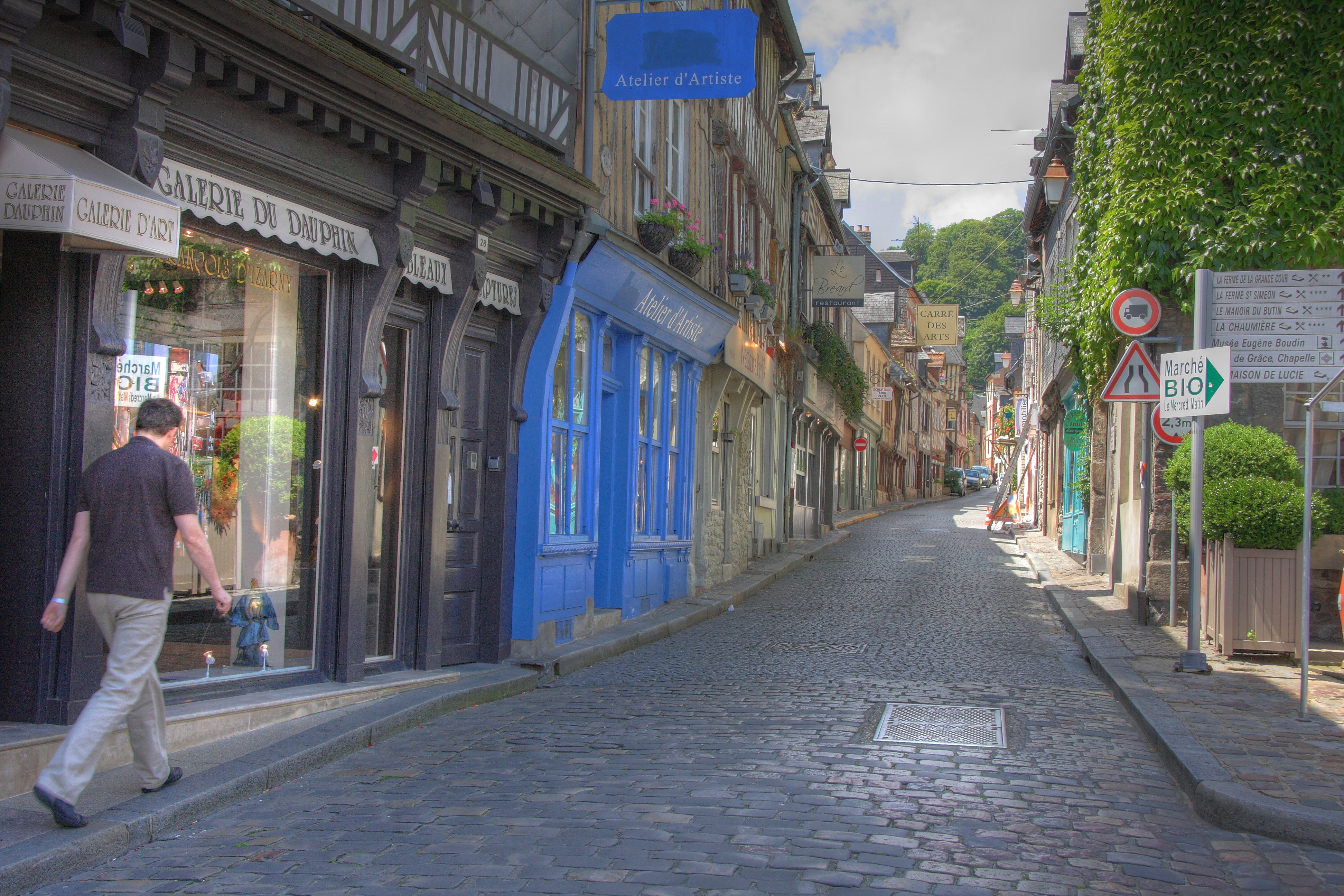 Une rue de Honfleur